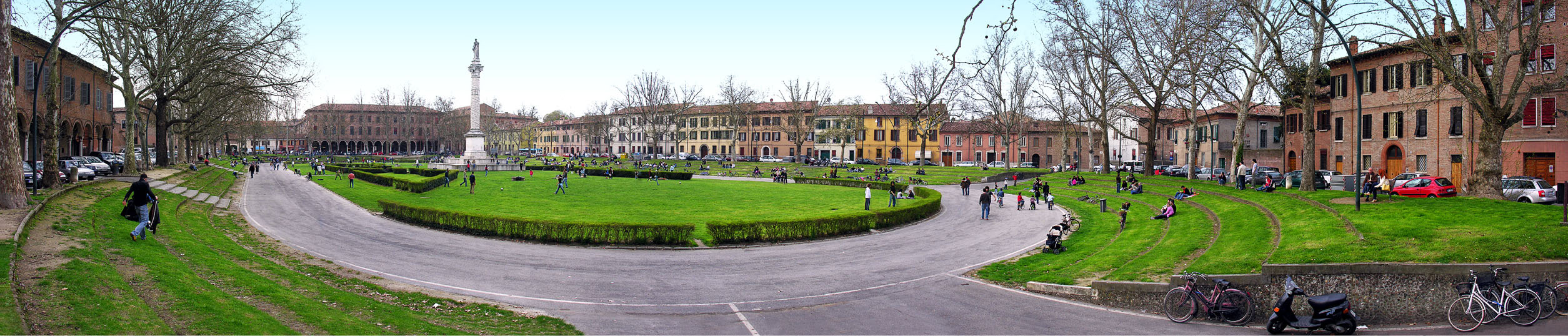 Piazza Ariostea, Ferrara - Italia.